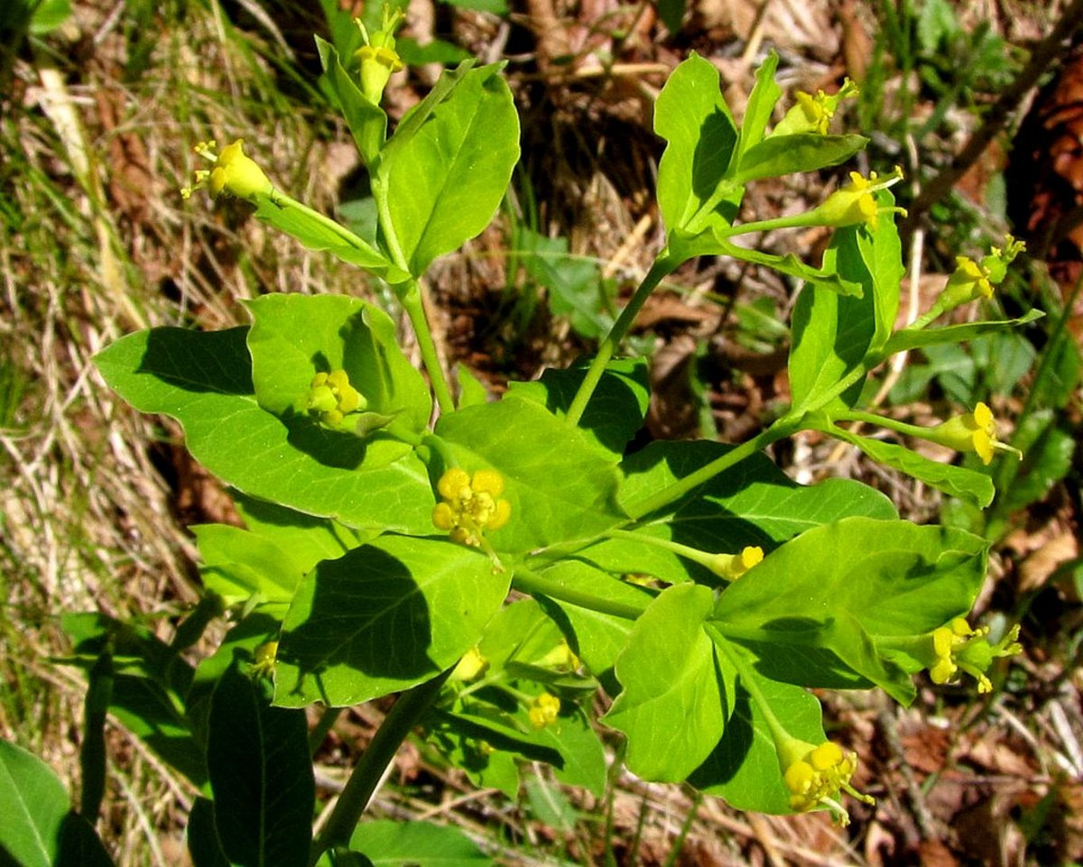 Kranjski mleček v dolini Kamniške Bele.